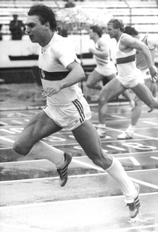 Frank Emmelmann ADN-ZB Thieme 12.5.84 Erfurt: Leichtathletik-Sportfest- Frank Emmelmann vom SC Magdeburg siegte über 100 m in einer Zeit von 10,19 ( 1,3 m pro s RWI).